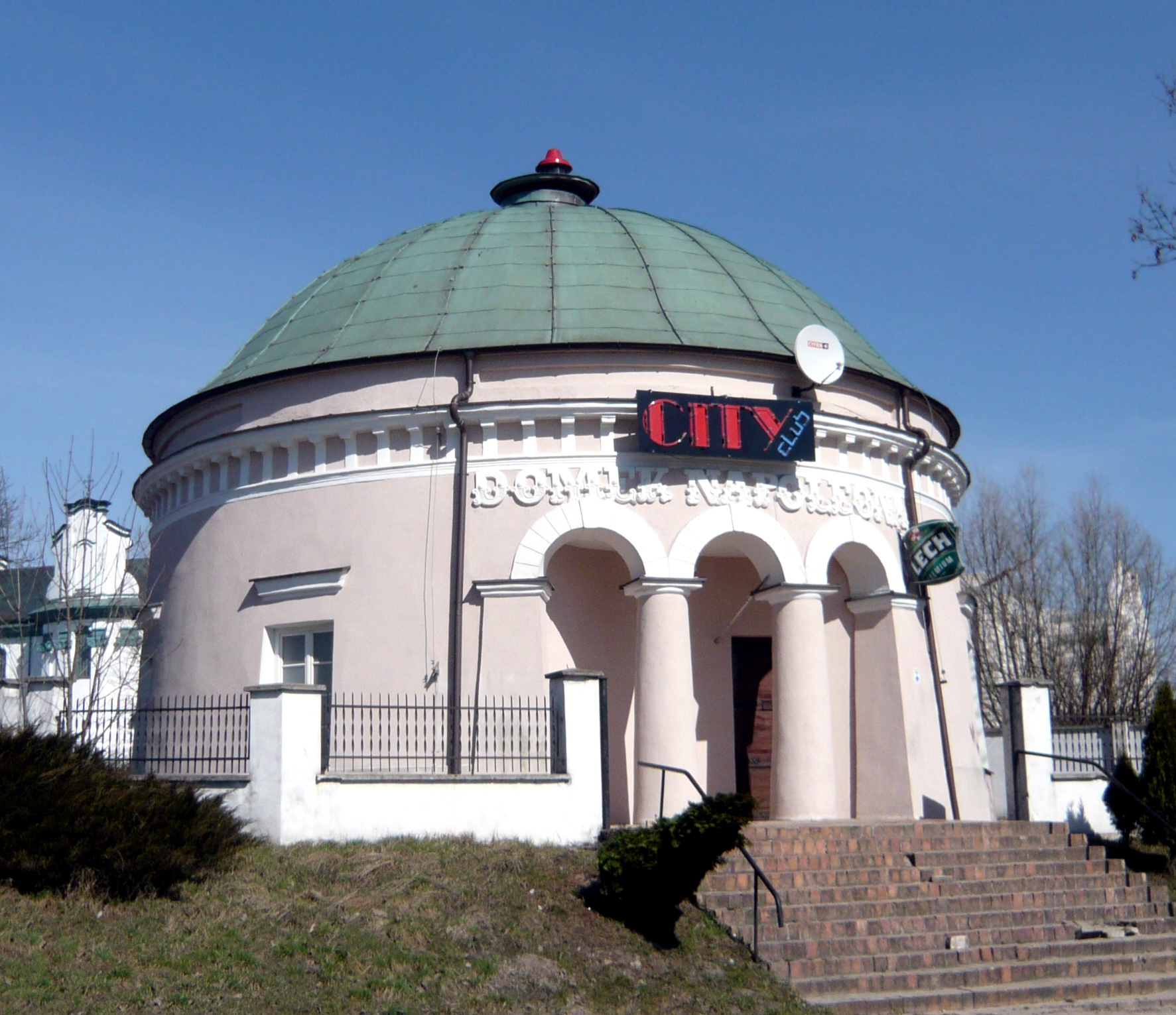 Białymstok, Aleja Jana Pawła II 62 - budynek dawnej komory celnej z początku XIX w., tzw. Domek Napoleona (zabytek nr A-281 z 1952-11-11)